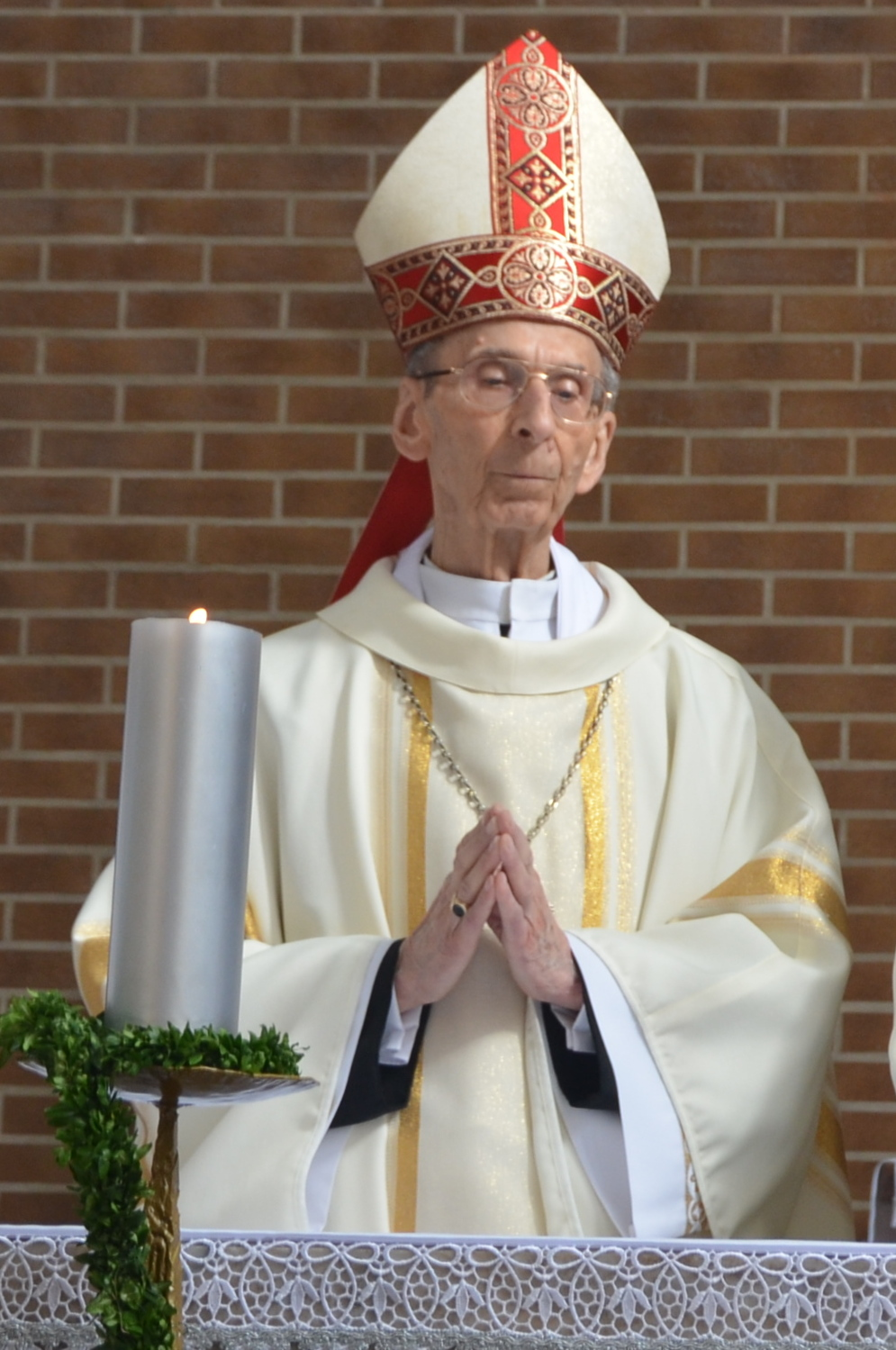 Biskup Jan Bagiński w czasie uroczystości 25 rocznicy konsekracji kościoła pw. św. Anny w Opolu-Chmielowicach 10 października 2015 r.